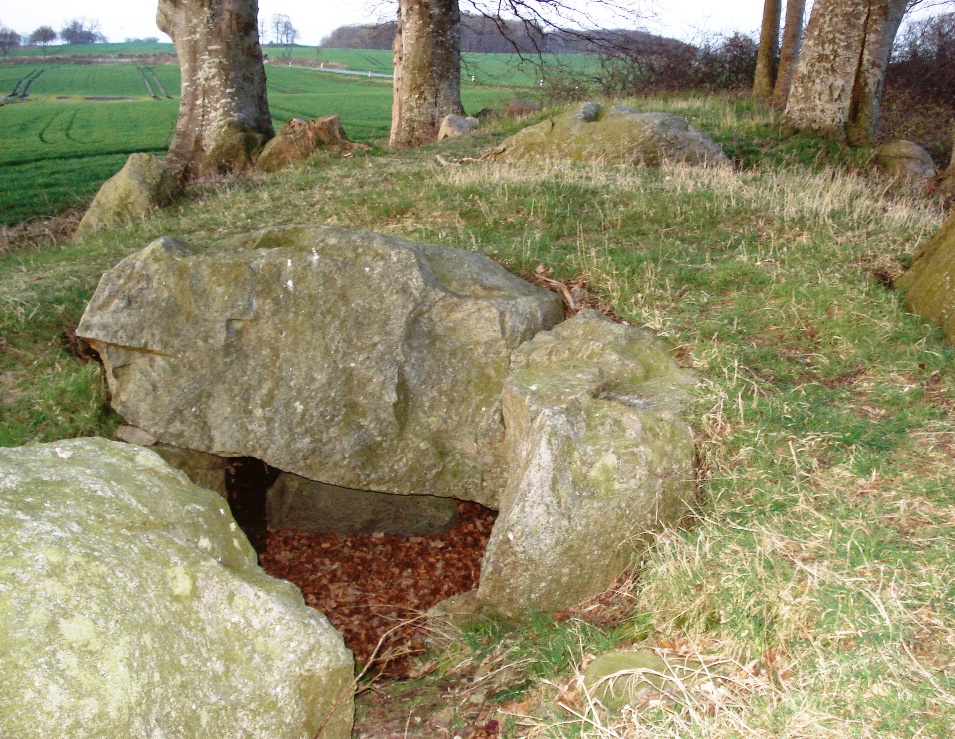 Langbetten bei Birkenmoor - West - Grabkammer 8 Sprockhoff-Nr 125